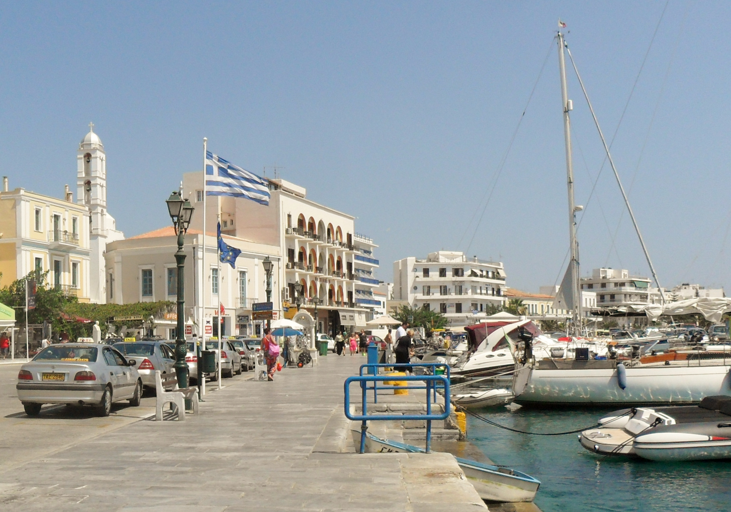 Tinos